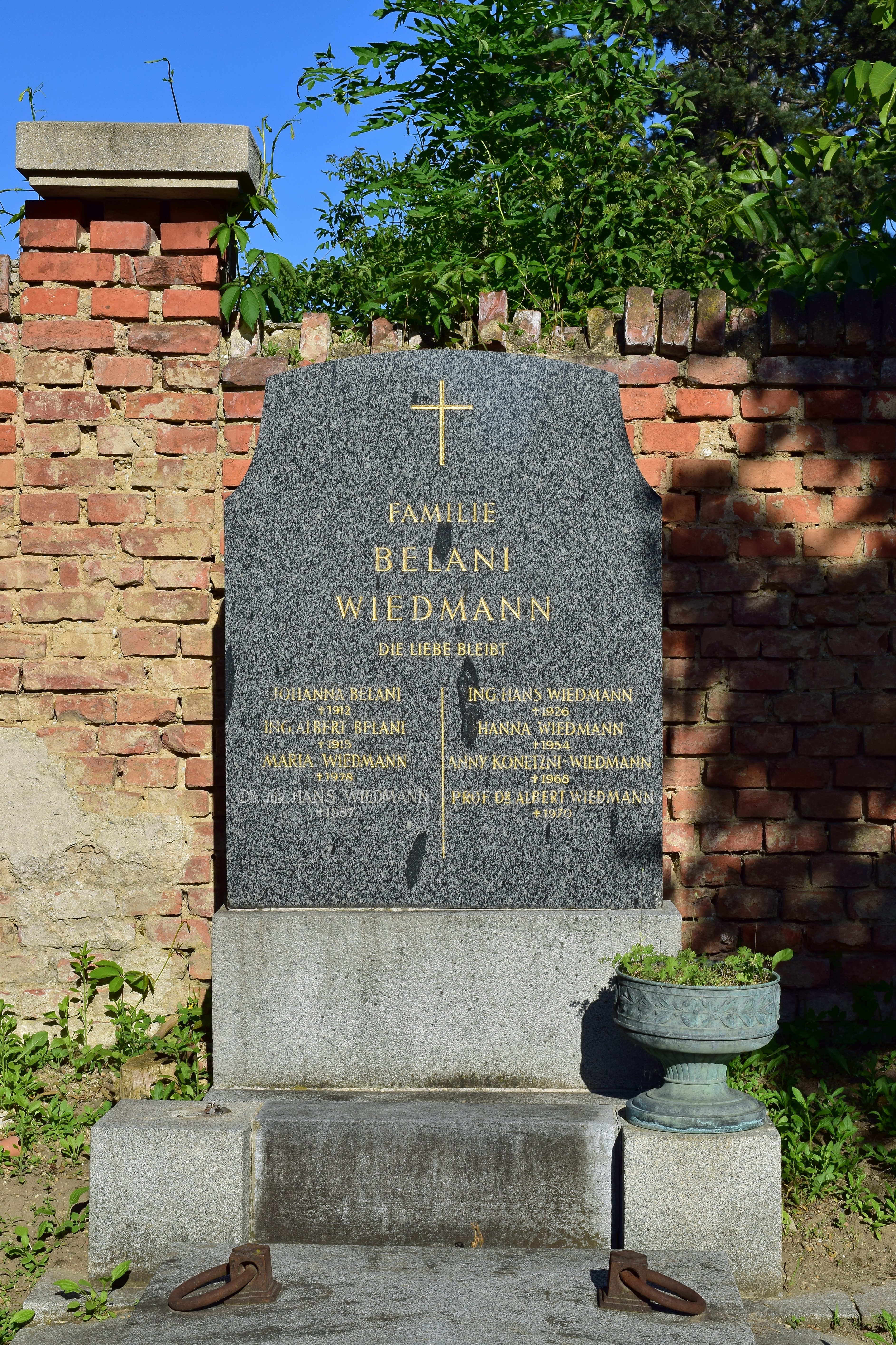 Ehrenhalber gewidmetes Grab von Albert Wiedmann auf dem evangelischen Friedhof im Wiener Zentralfriedhof